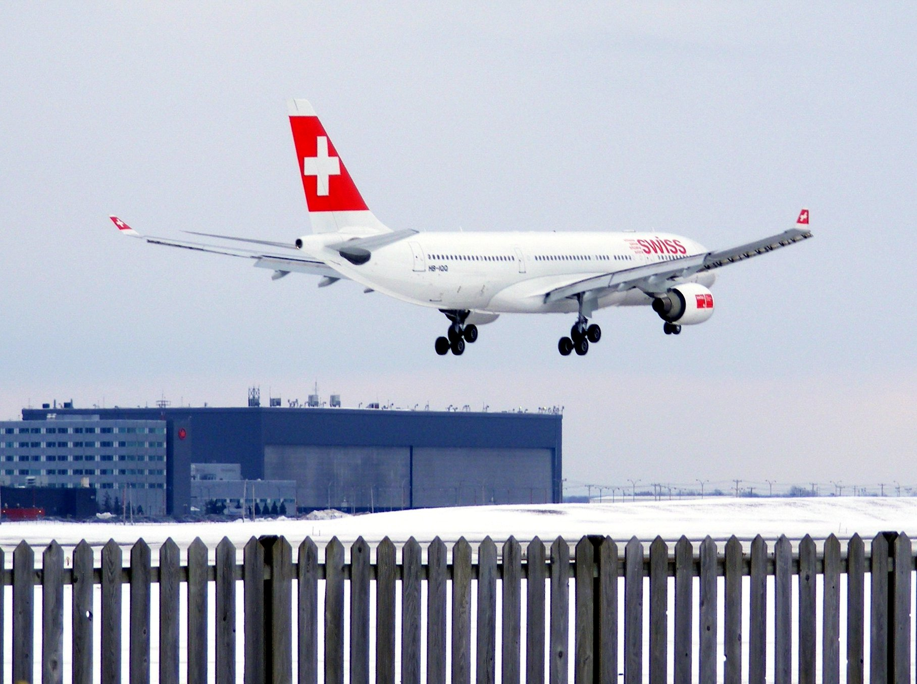 Swiss - Atterissage - YUL 24 R